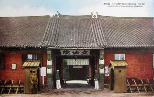 Legislative council of Manchukuo（满洲国立法院）